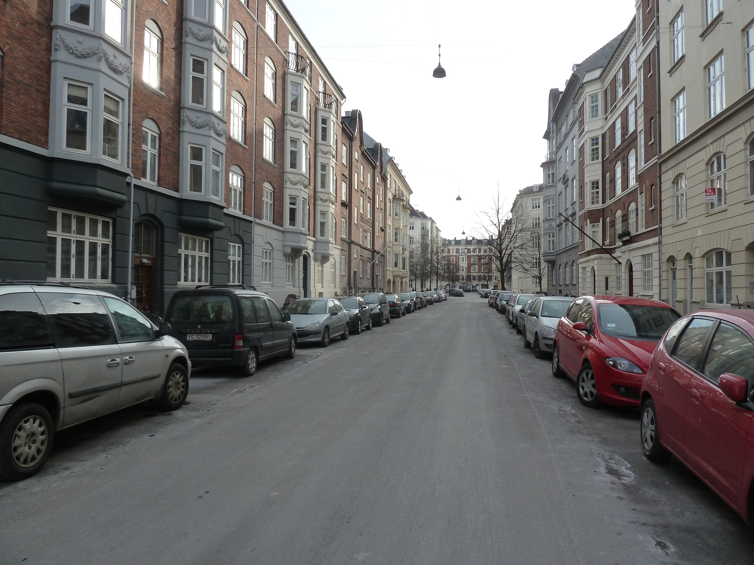 The street Ribegade in Østerbro in Copenhagen.